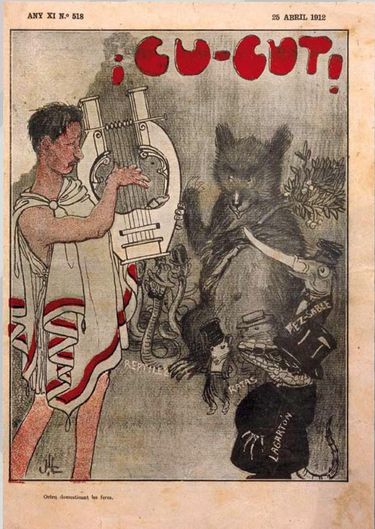 Darrera portada del ca:!Cu-cut! del 25-4-1912 abans que el tanquessin. Posteriorment es varen publicar alguns exemplars, però ja sense continuïtat